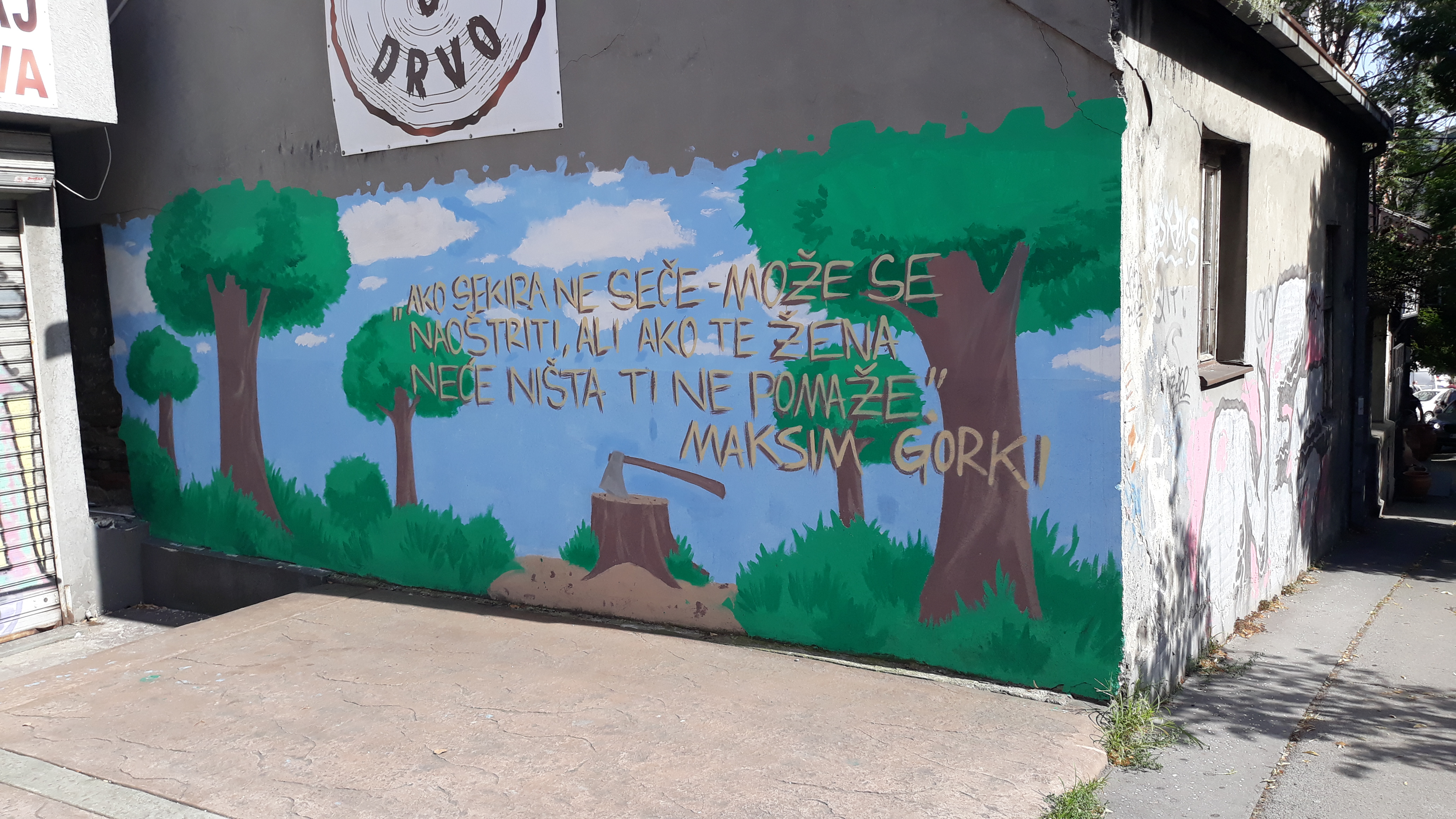 Мисао Максима Горког, графит у илици у Београду, названој по његовом имену.